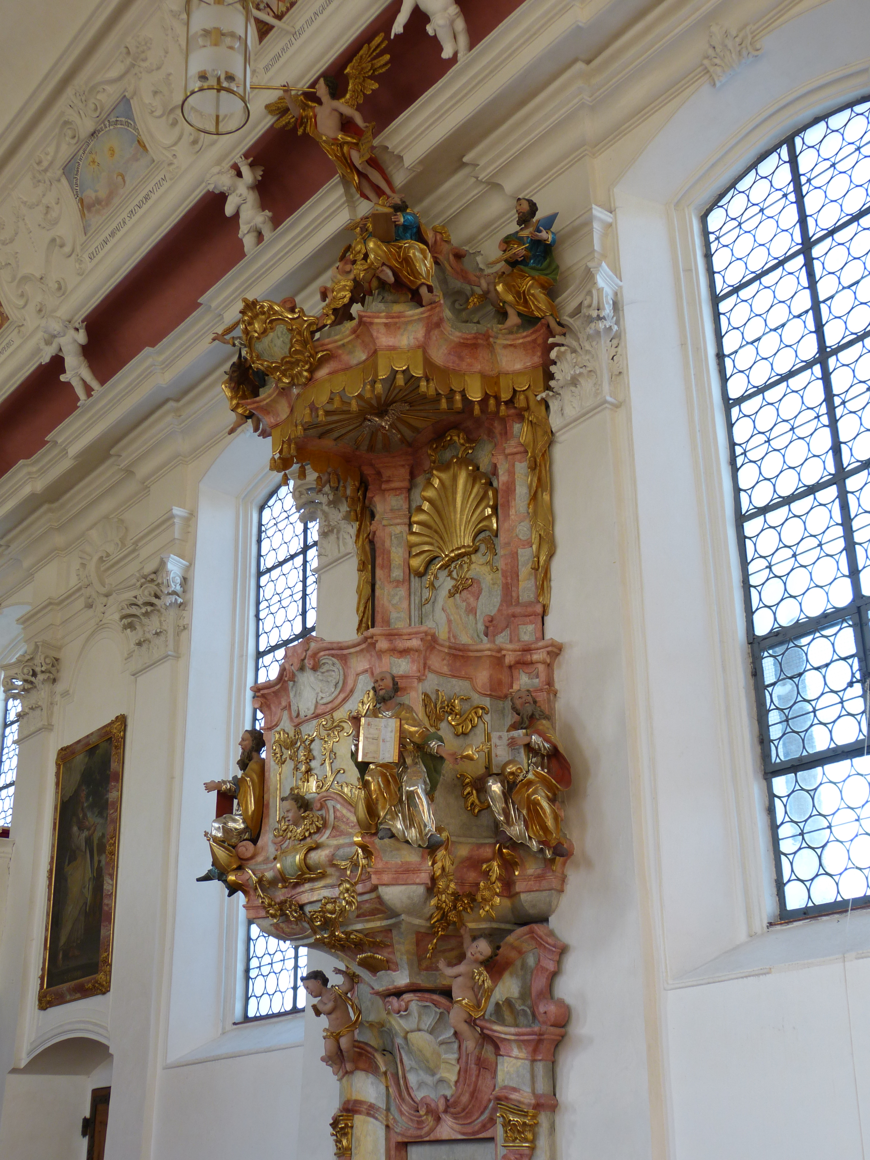 Wallfahrtskirche Maria Schnee, Legau, Landkreis Unterallgäu, Bayern